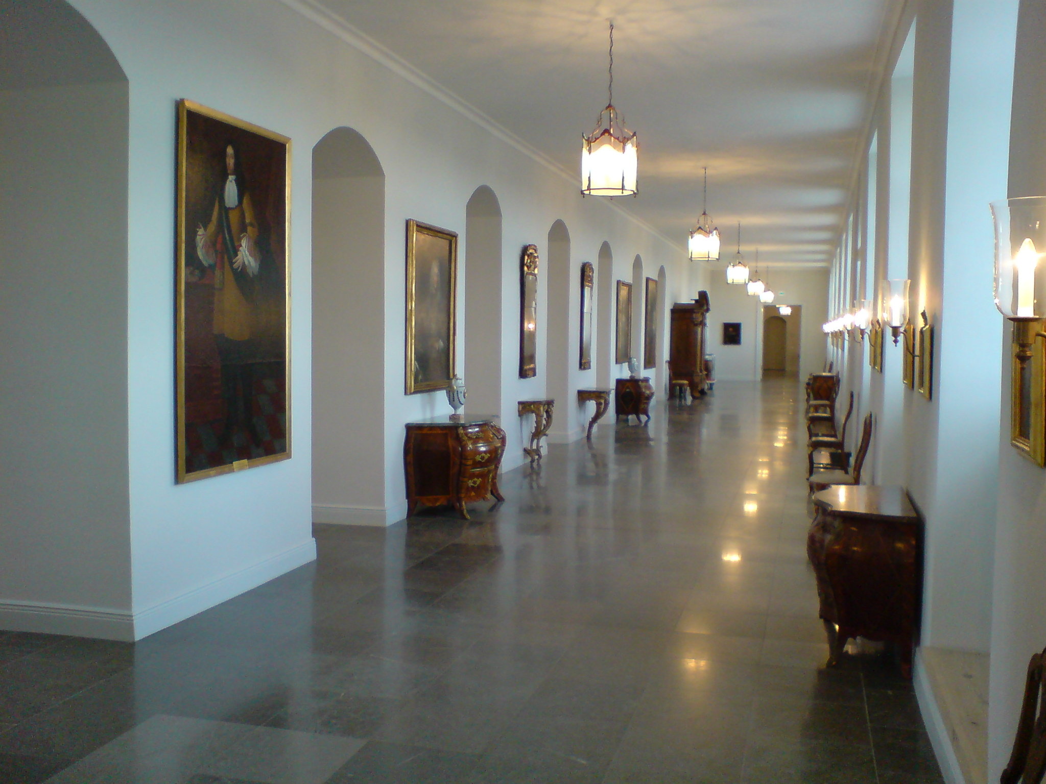 Schloss Plön, Galerie